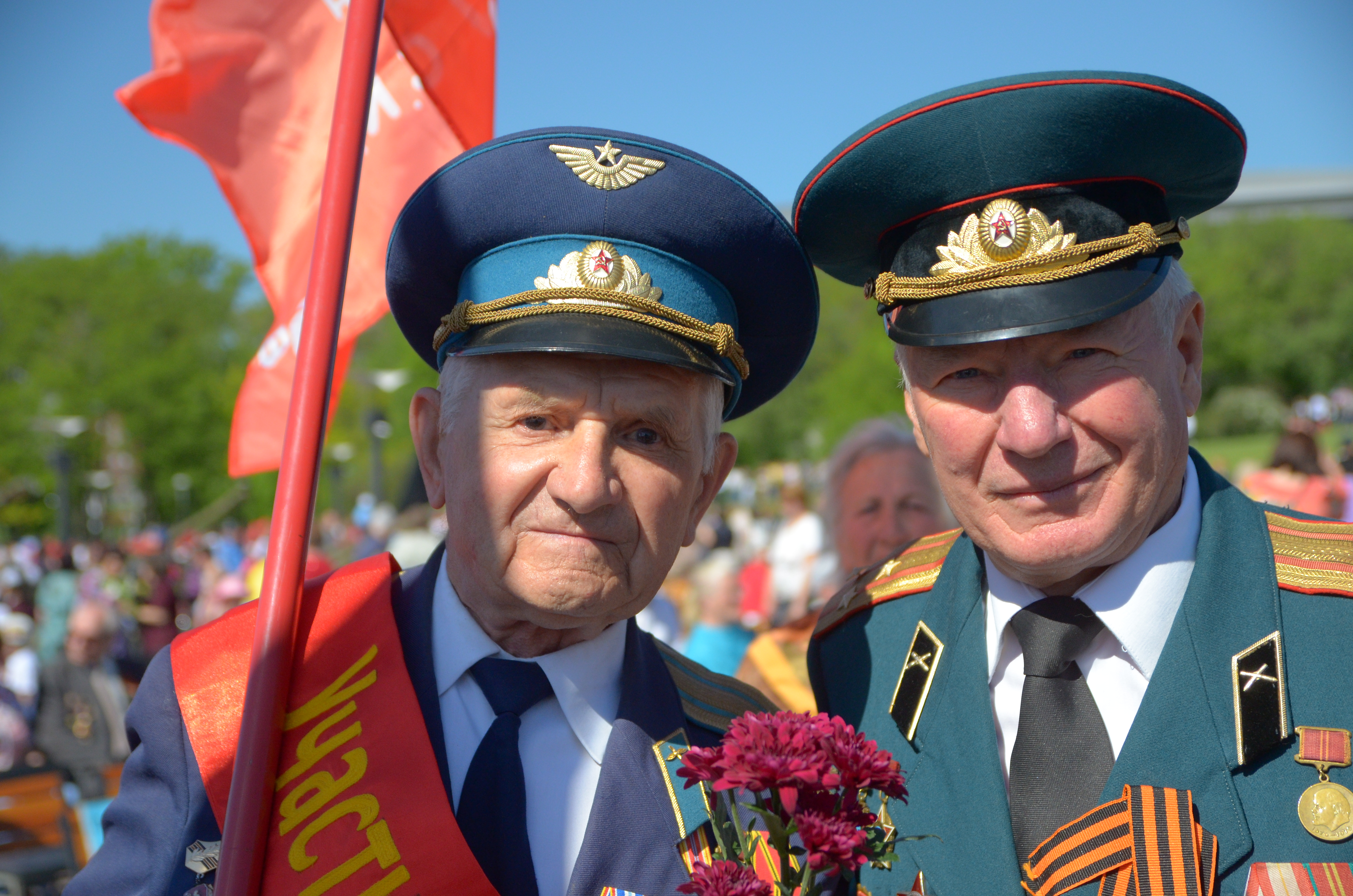 День Победы в Донецке